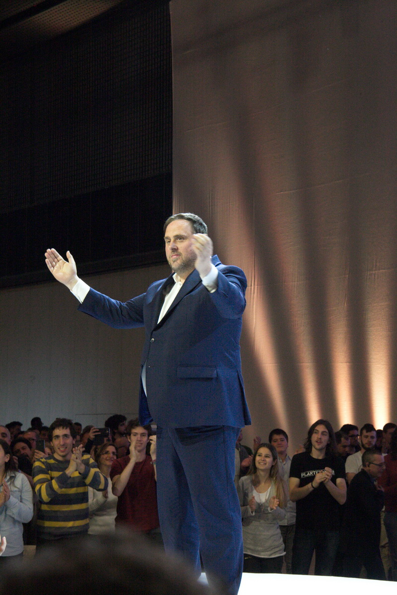 Oriol Junqueras a l'Acte d'ERC pro-referèndum. Barcelona 4-3-2017